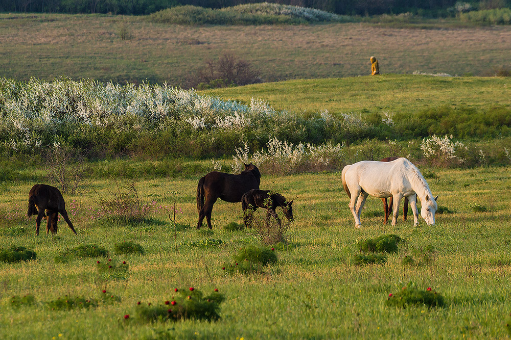 Хомуто́вський степ — відділ Українського державного степового заповідника